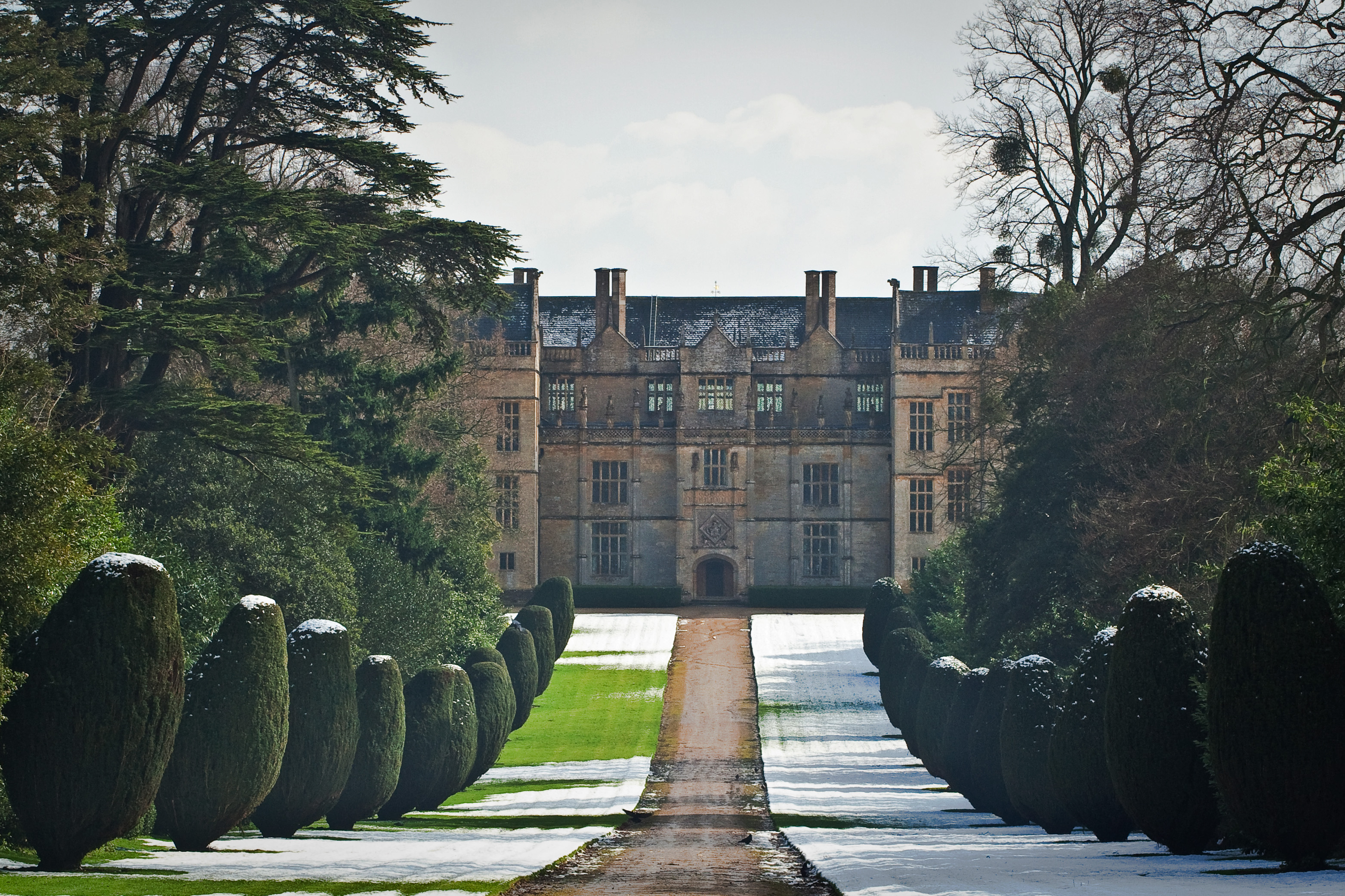 Near Yeovil in Somerset.